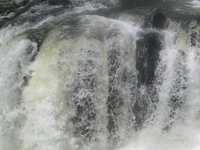 தமிழகத்தின் பிரபலமான ஒகேனக்கல் அருவியில் அழகான ஒரு காட்சி.